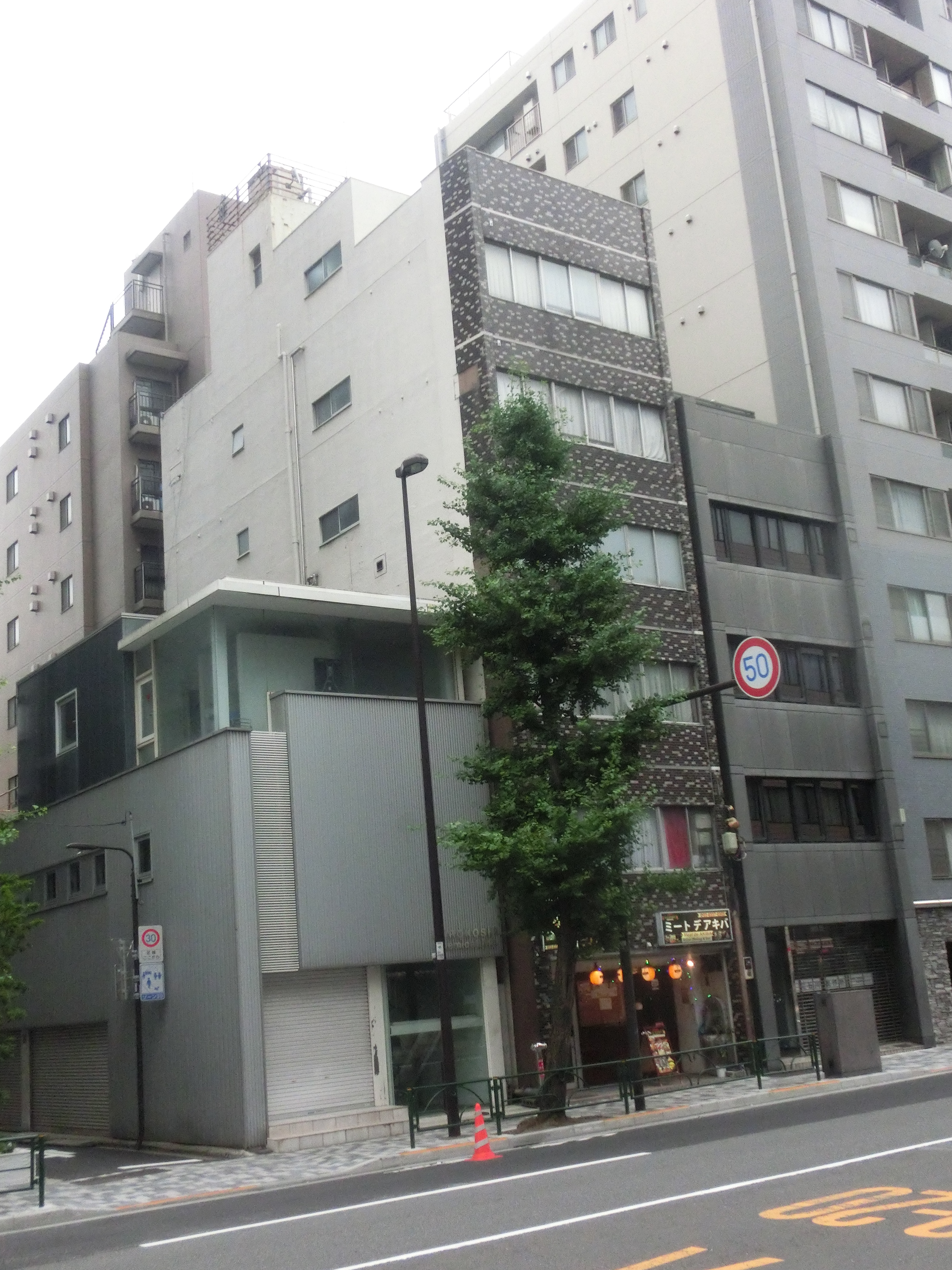 秋葉原・林ビル